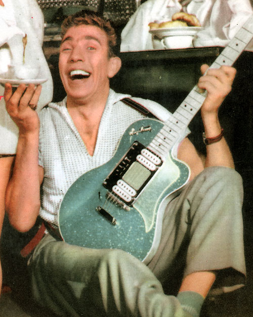 Owe Thörnqvist